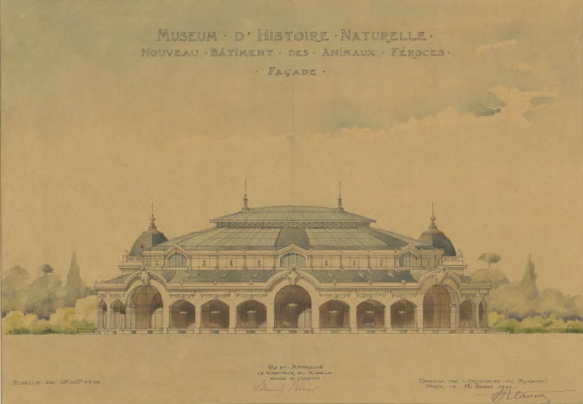 Muséum national d’histoire naturelle. Nouveau bâtiment des animaux féroces. Élévation, par Blavette, architecte du Muséum